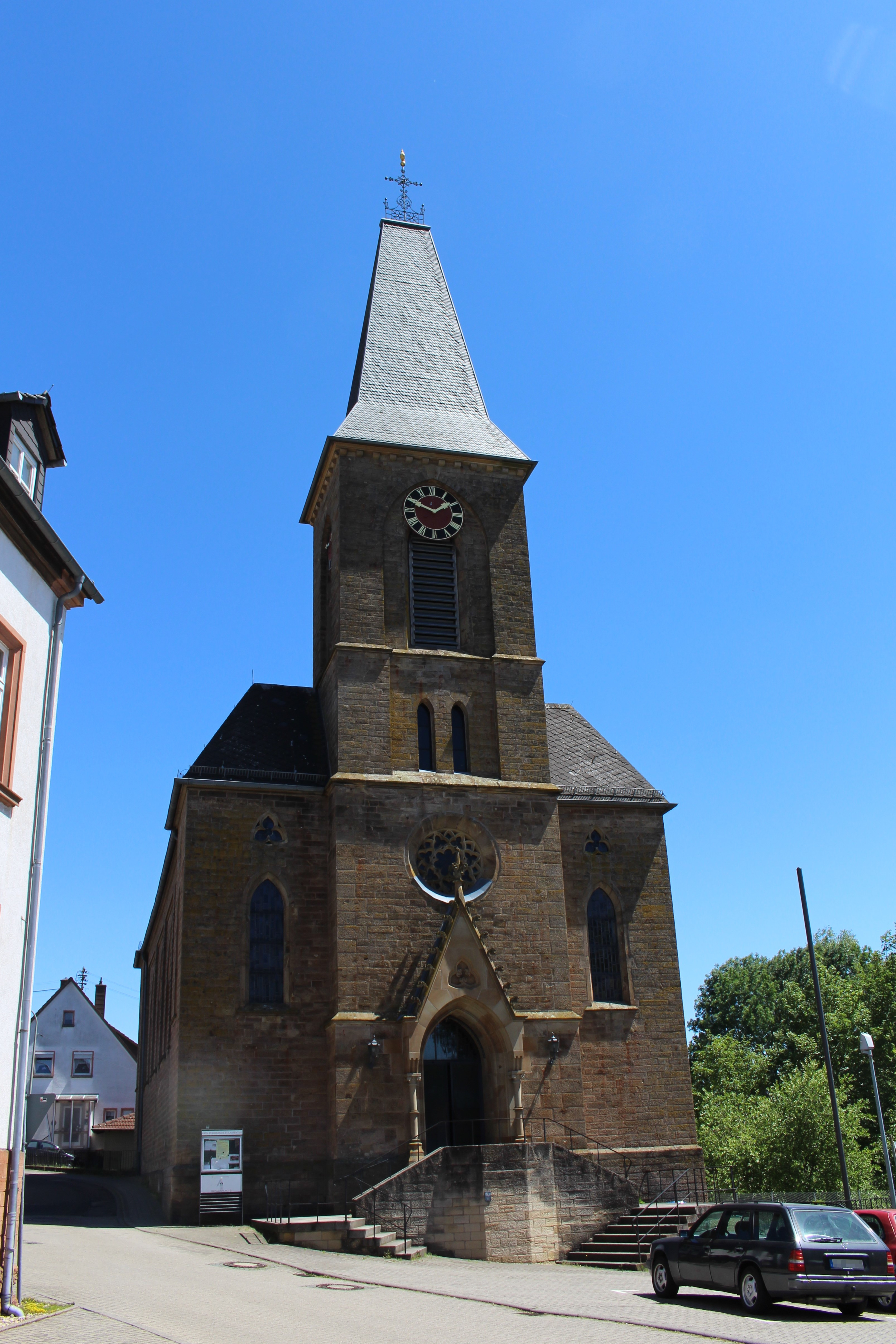 Sandsteinquaderbau, 1880–83, Architekt Franz Schöberl.